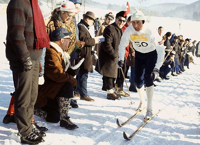 HARALD GRØNNINGEN: Vant 15 km langrenn i Grenoble i 1968, og var også med på stafettlaget som vant.